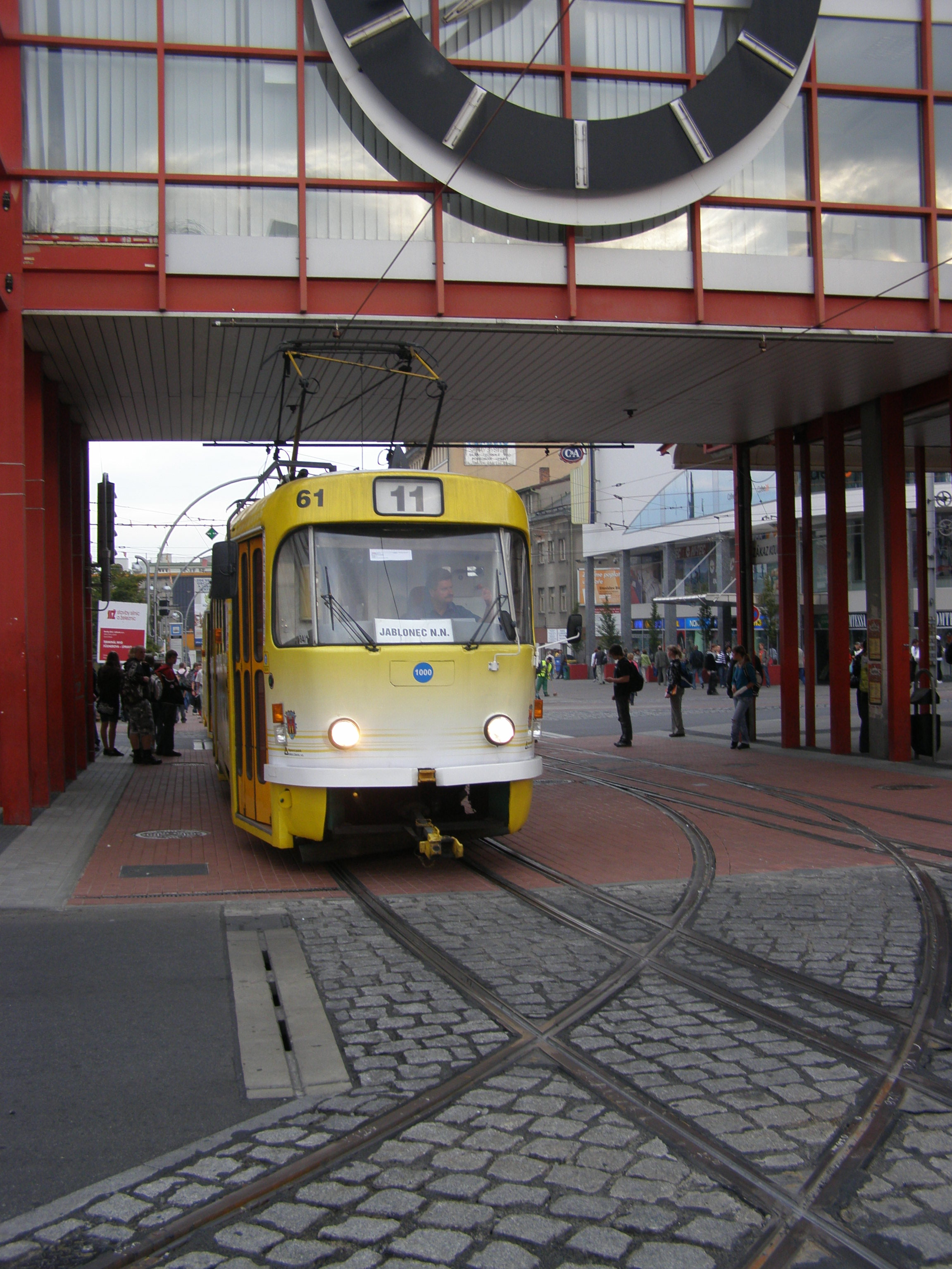 Tramvaj na lince 11 projíždí terminálem Fügnerova v Liberci